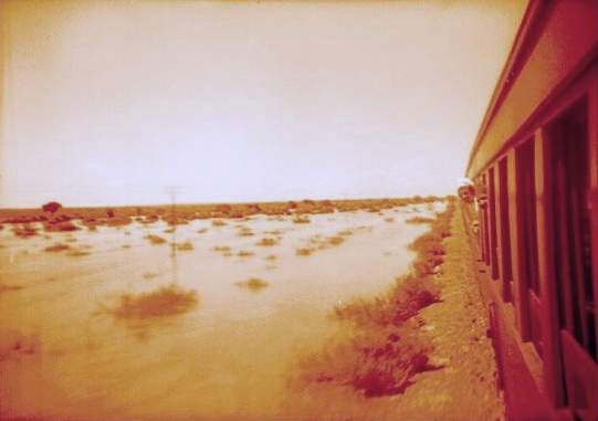 View From a Train in Südwestafrika